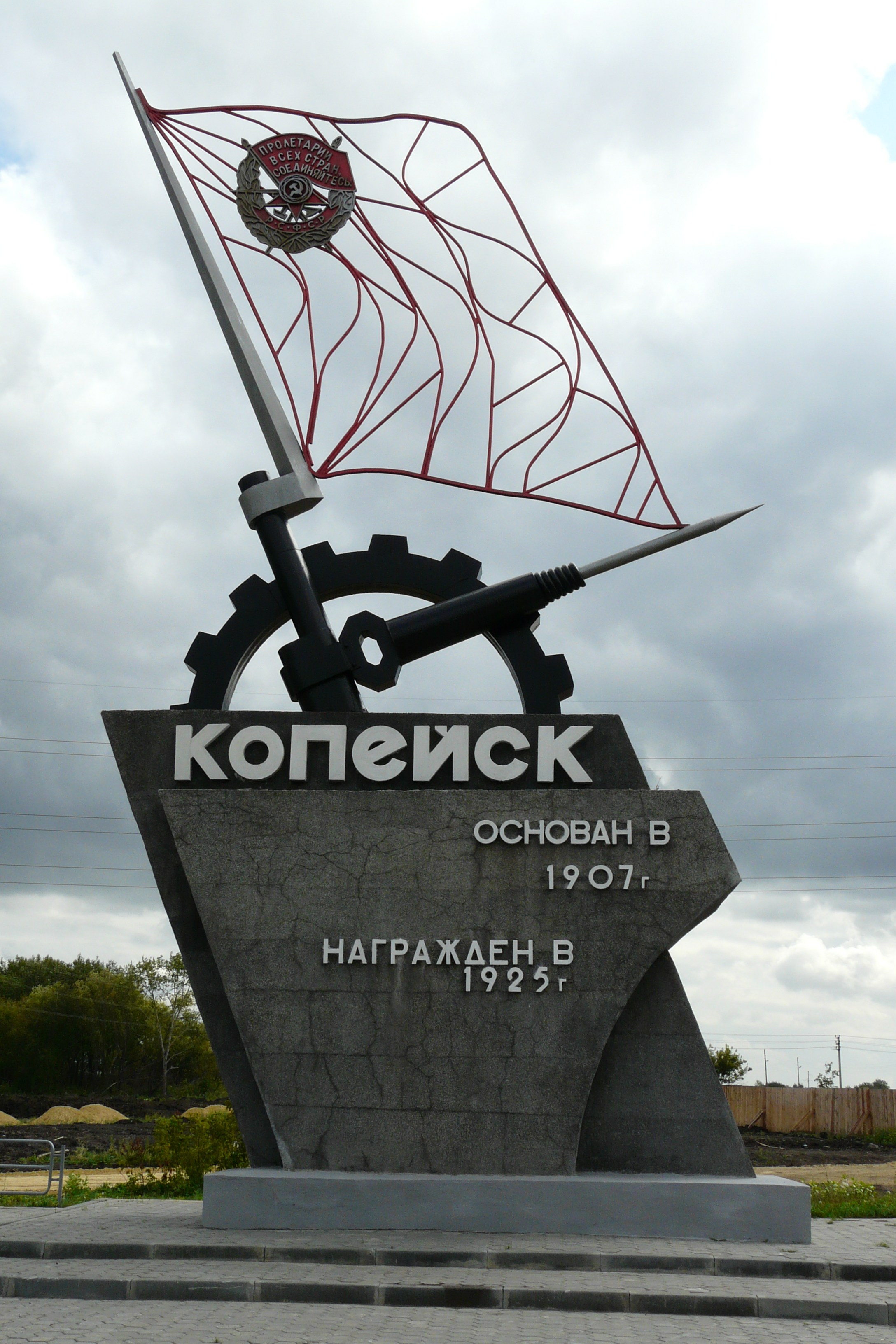 Монумент на въезде в Копейск